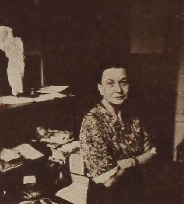 Růžena Vacková (1901-1982), česká teoretička a historička umění, divadelní kritička a pedagožka